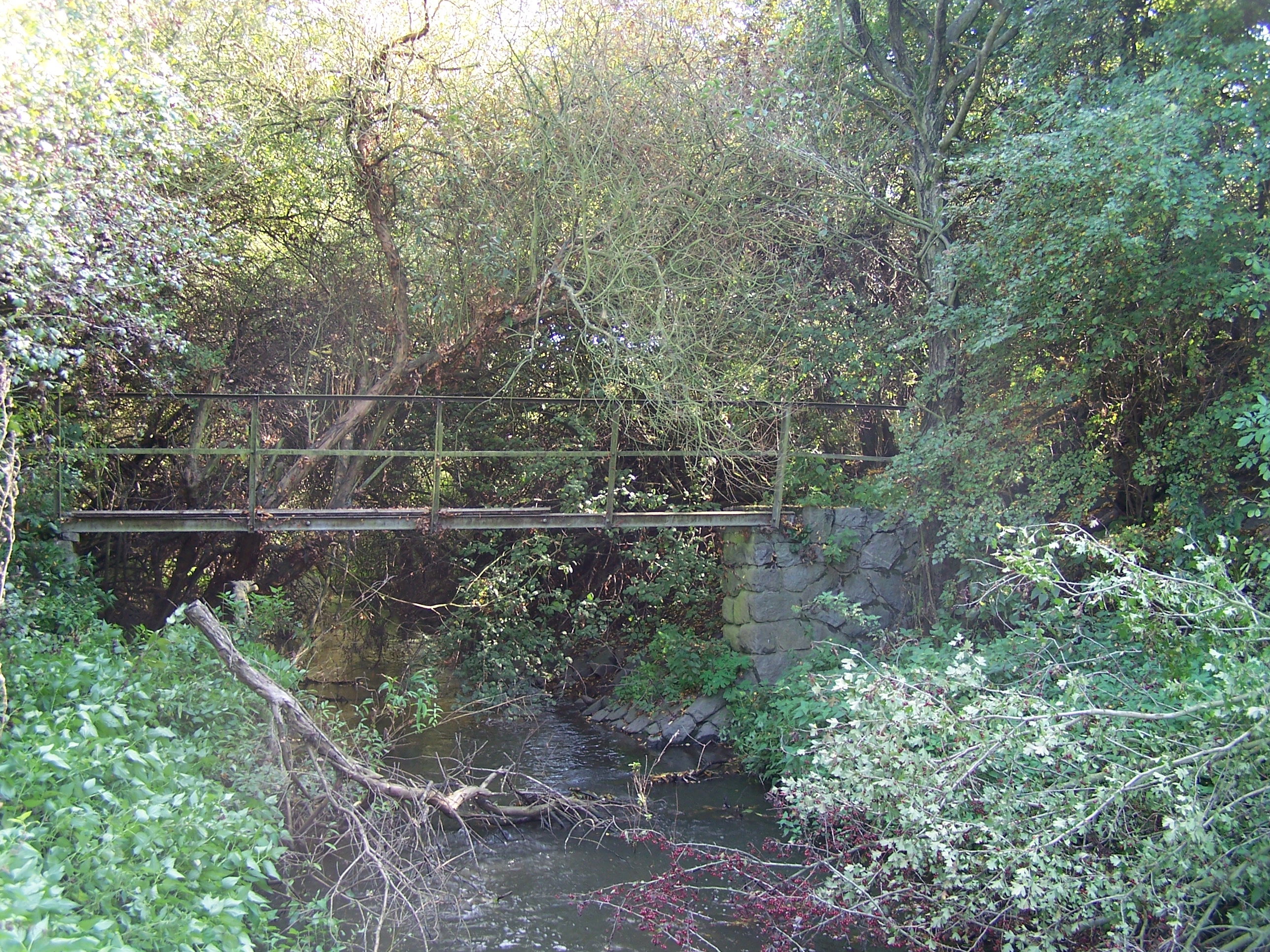 Česky: Mostek přes Sánský kanál v těsné blízkosti soutoku s Mrlinou